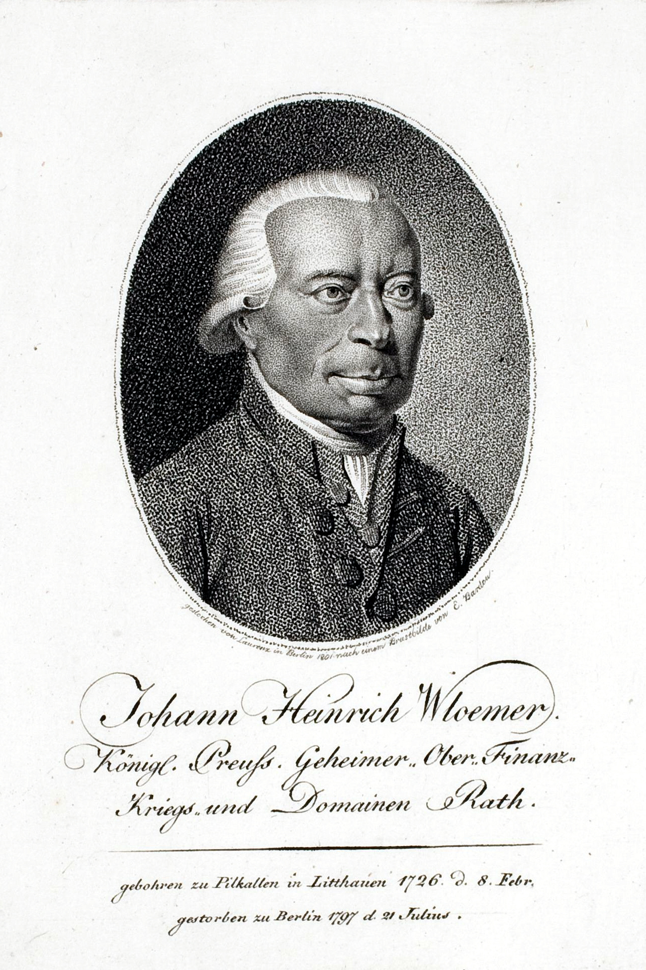 Bildnis Johann Heinrich Wlömer, Berlin, 1802